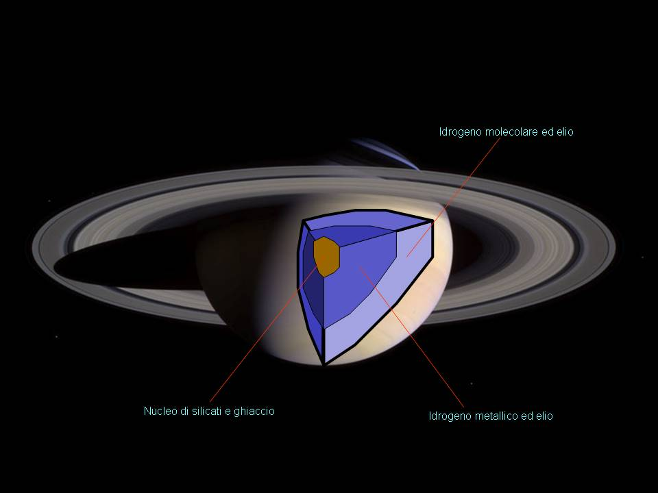 Interno di Saturno